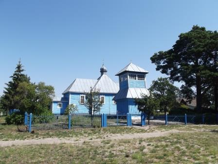 Царква ў Місяцічах (Беларусь)